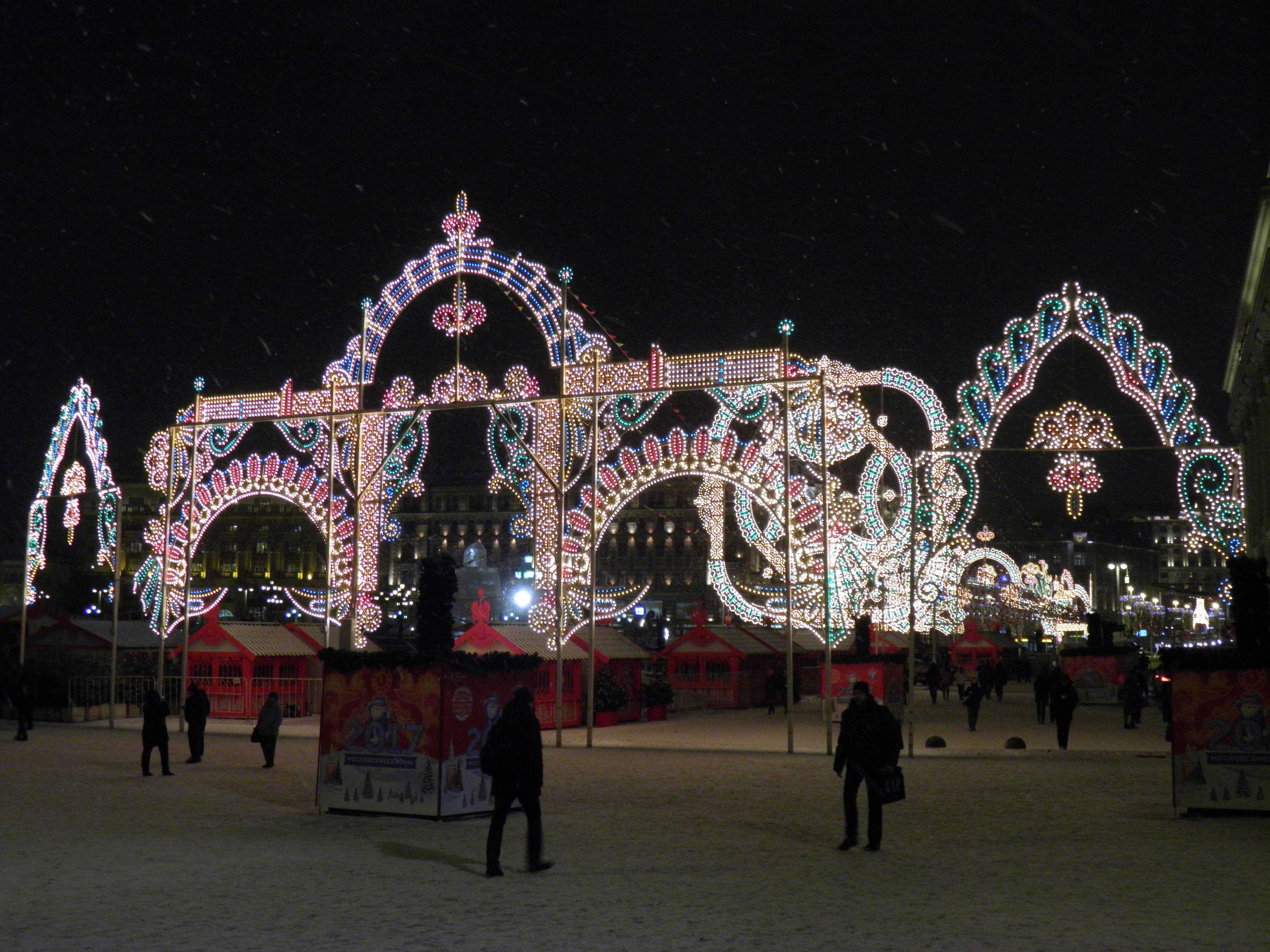 Illuminations place de la Révolution à Moscou (Russie).